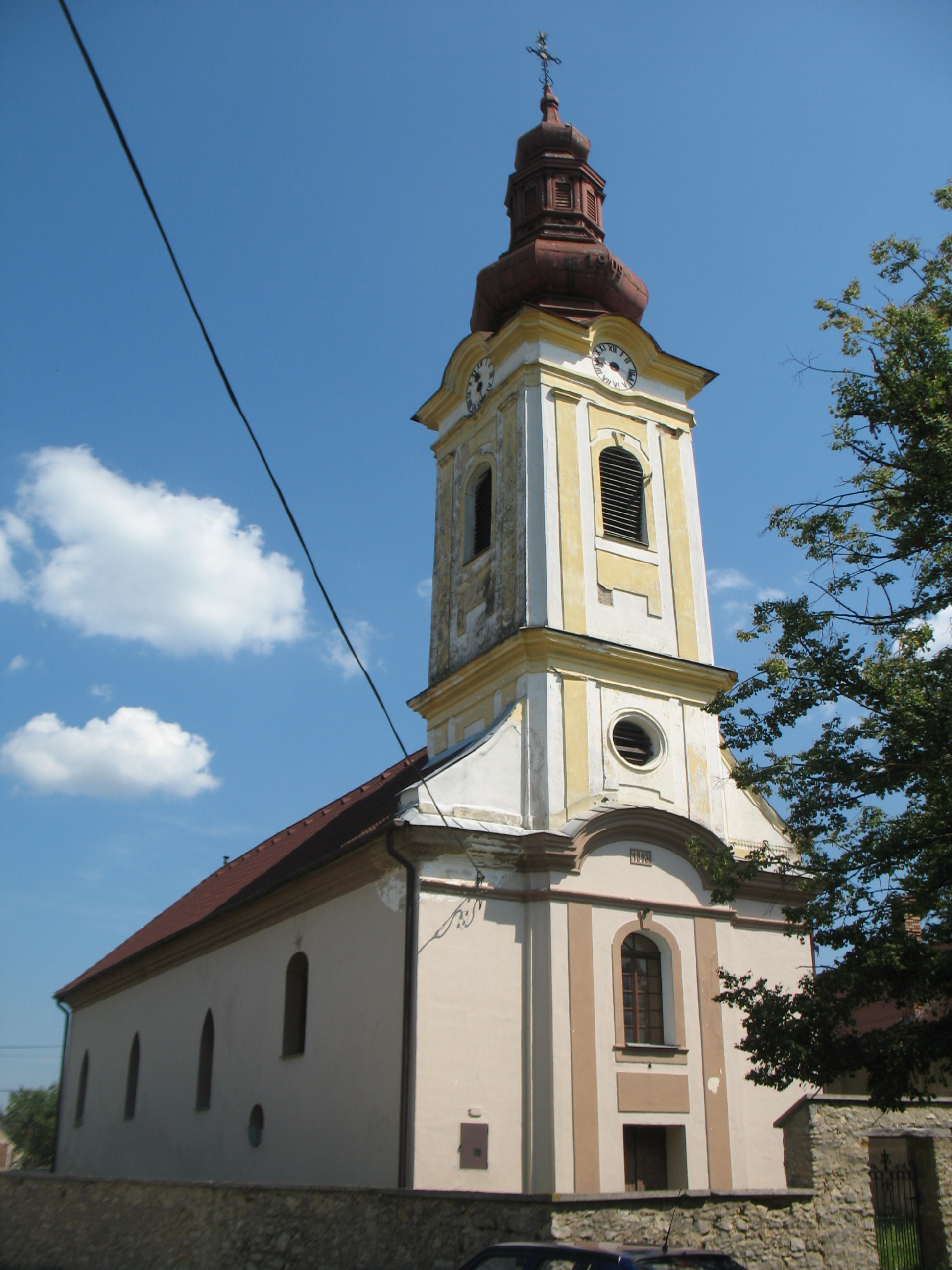 Gömörpanyit